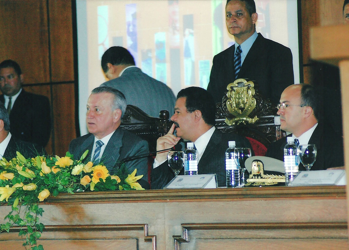 Francisco Domínguez Brito en la inauguración del Palacio de Justicia de Santo Domingo, 5 de enero de 2005.